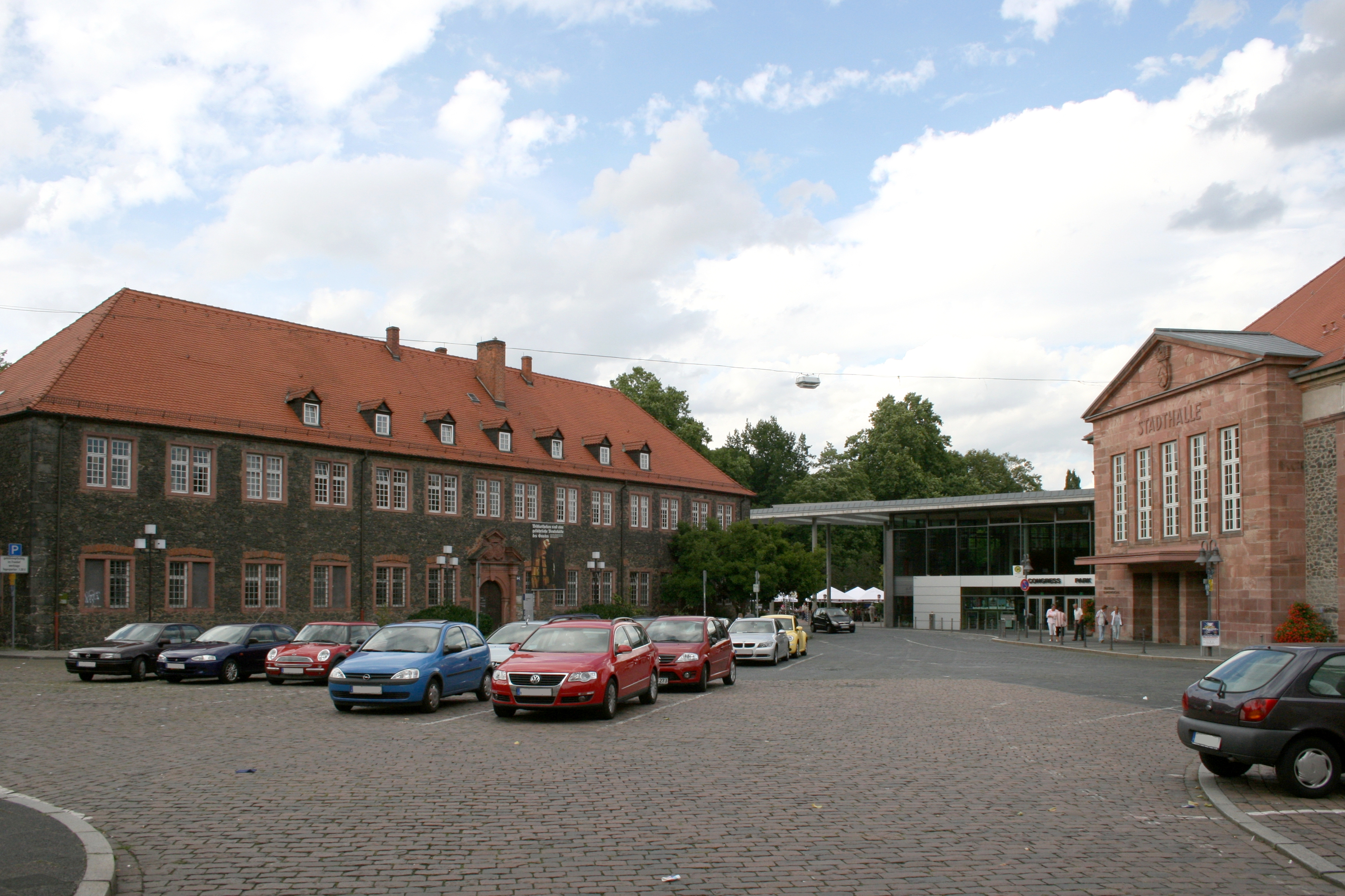 Stadtschloss Hanau, Ansicht des Schlossplatzes von Süden (2008). Links Kanzleigebäude (Stadtbibliothek), in der Mitte des Congress Park Hanau, rechts Marstall (Stadthalle)